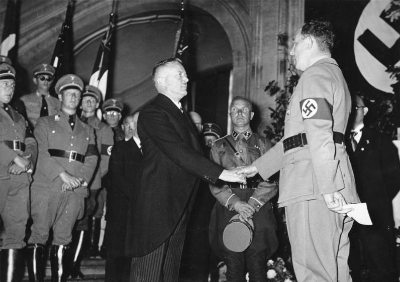 Berlin, Roland Freisler (r.) und Heinrich Lautz Zentralbild 31.8.1936. Die nationalsozialistische Ausrichtung der Justiz im faschistischen Deutschland Die Einführung des neuernannten Generalstaatsanwaltes beim Landgericht Berlin, Heinrich Lautz, in der grossen Eingangshalle des neuen Kriminalgerichts. UBz.: Staatssekretär Dr. Roland Freisler beglückwünscht den neuen Generalstaatsanwalt Heinrich Lautz. [Aufnahme: Scherl] Abgebildete Personen: Freisler, Roland Dr.: Präsident des Volksgerichtshofes, Deutschland Lautz, Heinrich: Oberreichsanwalt am Volksgerichtshof, Deutschland